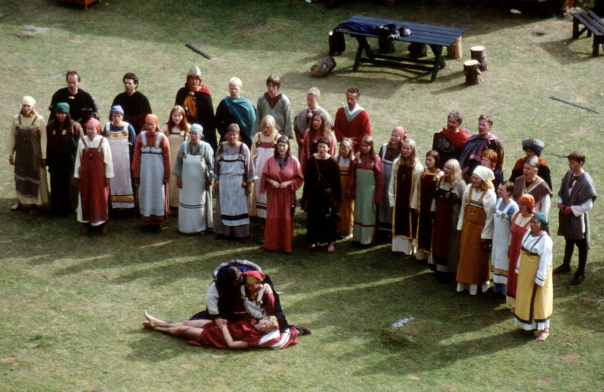 Bilde fra steigen sagaspill 2003. Pappa tok det. -- ThorRune